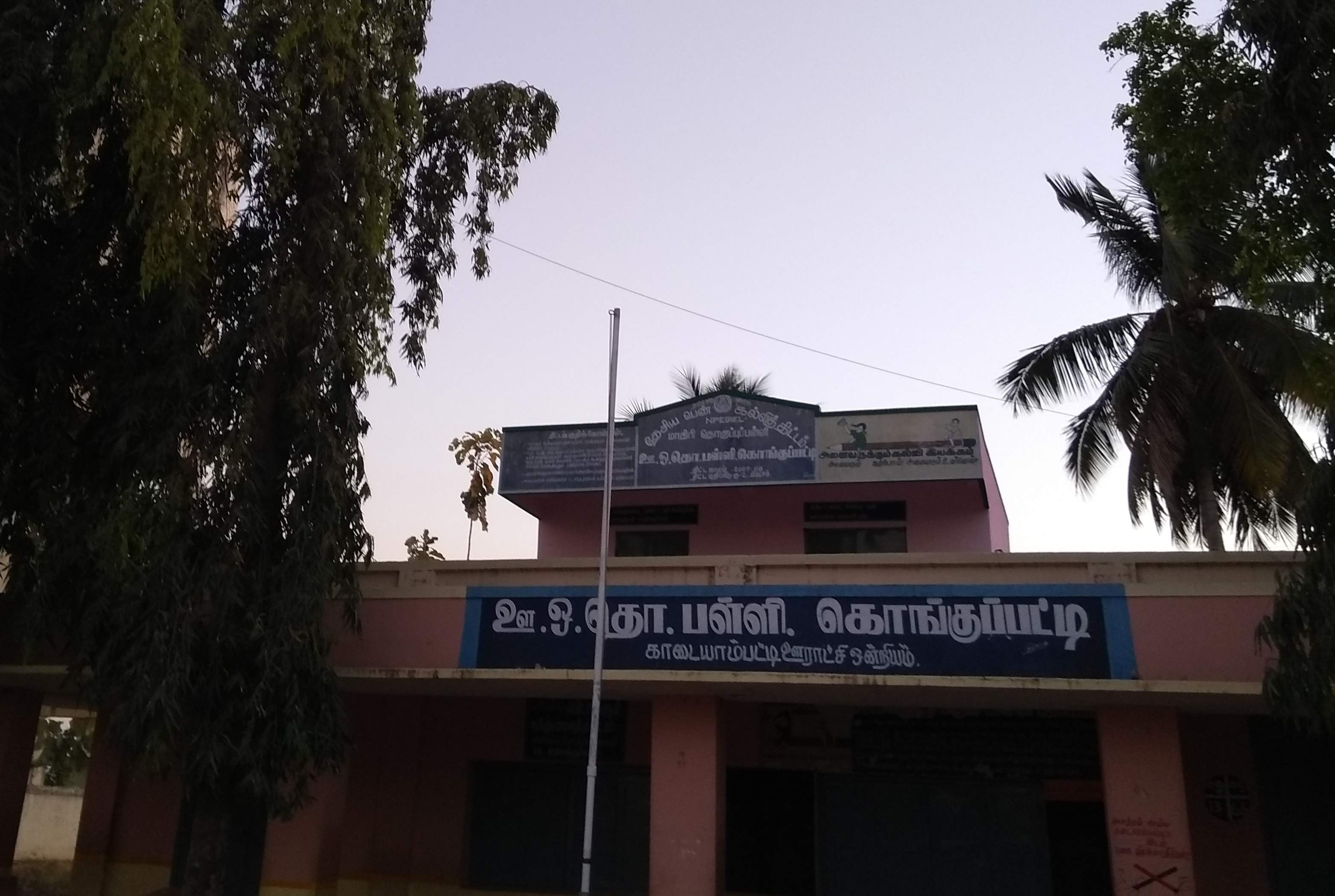 கொங்குப்பட்டி ஊராட்சி ஒன்றிய தொடக்கப்பள்ளி, ஒமலூர் வட்டம், சேலம் மாவட்டம், தமிழ்நாடு, இந்தியா ஒன்றியம்.